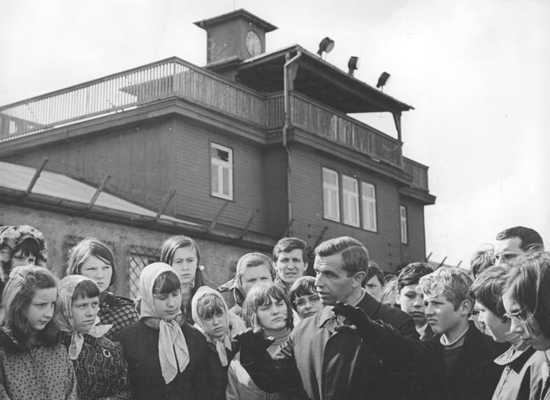 Weimar, Jugendstunde in Buchenwald Zentralbild Demme 4.4.1970- Bezirk Erfurt: Schüler besuchten die Nationale Mahn- und Gedenkstätts Buchenwald-Anläßlich ihrer Jugendweihe besuchten Schüler der 8. Klase der 7. Oberschule Eisenach das ehemalige KZ Buchenwald. Der Direktor der Nationalen Mahn- und Gedenkstätte Buchenwald, Klaus Trostorff, erlebte die Selbstbefreiung als Häftling im KZ Buchenwald mit. Zur Großkundgebung anläßlich des 25. Jahrestages der Selbstbefreiung des KZ Buchenwald werden am 11. April ungefähr 15000 Teilnehmer erwartet.